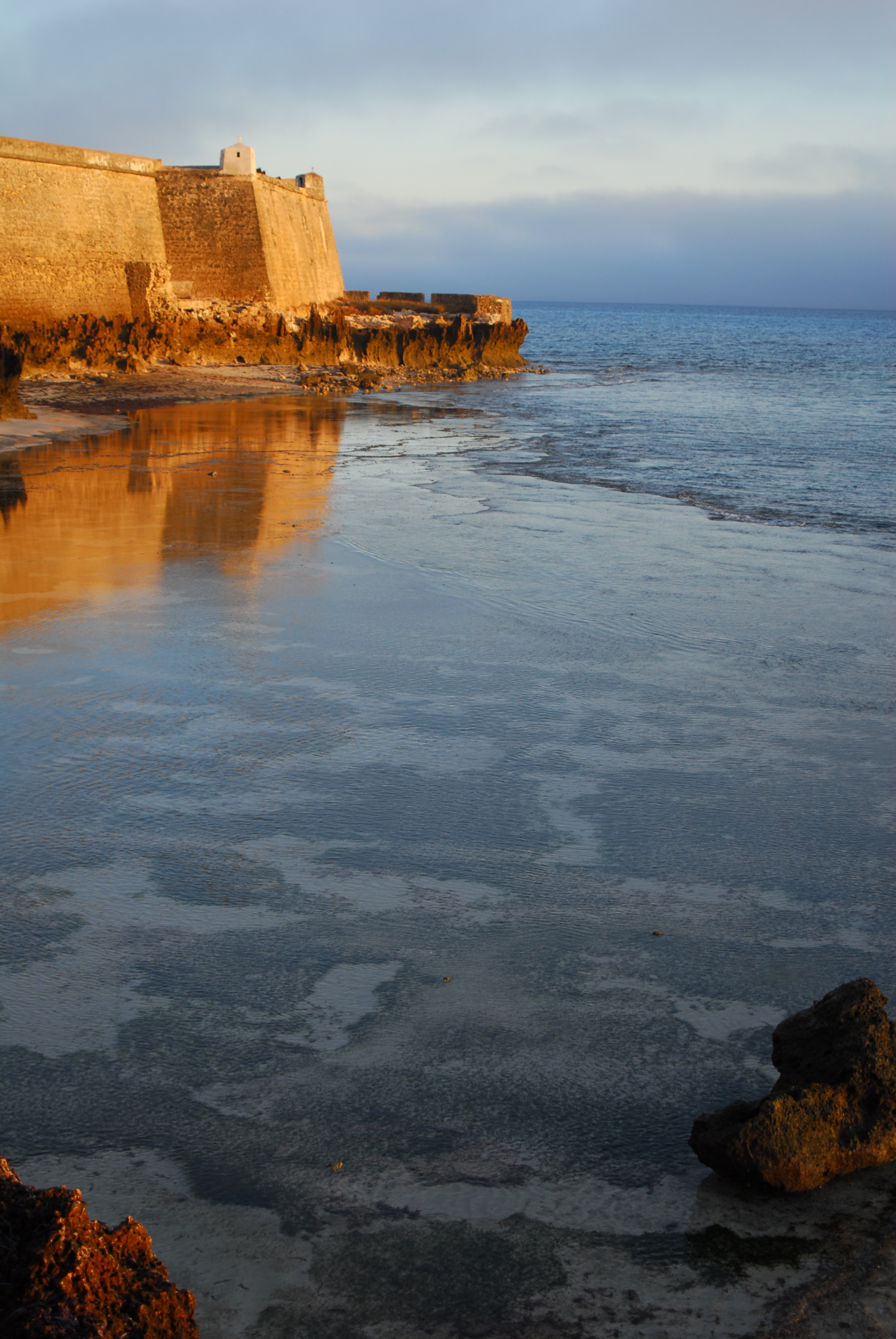 Fortaleza de S. Sebastião, Ilha de Moçambique, Mozambique